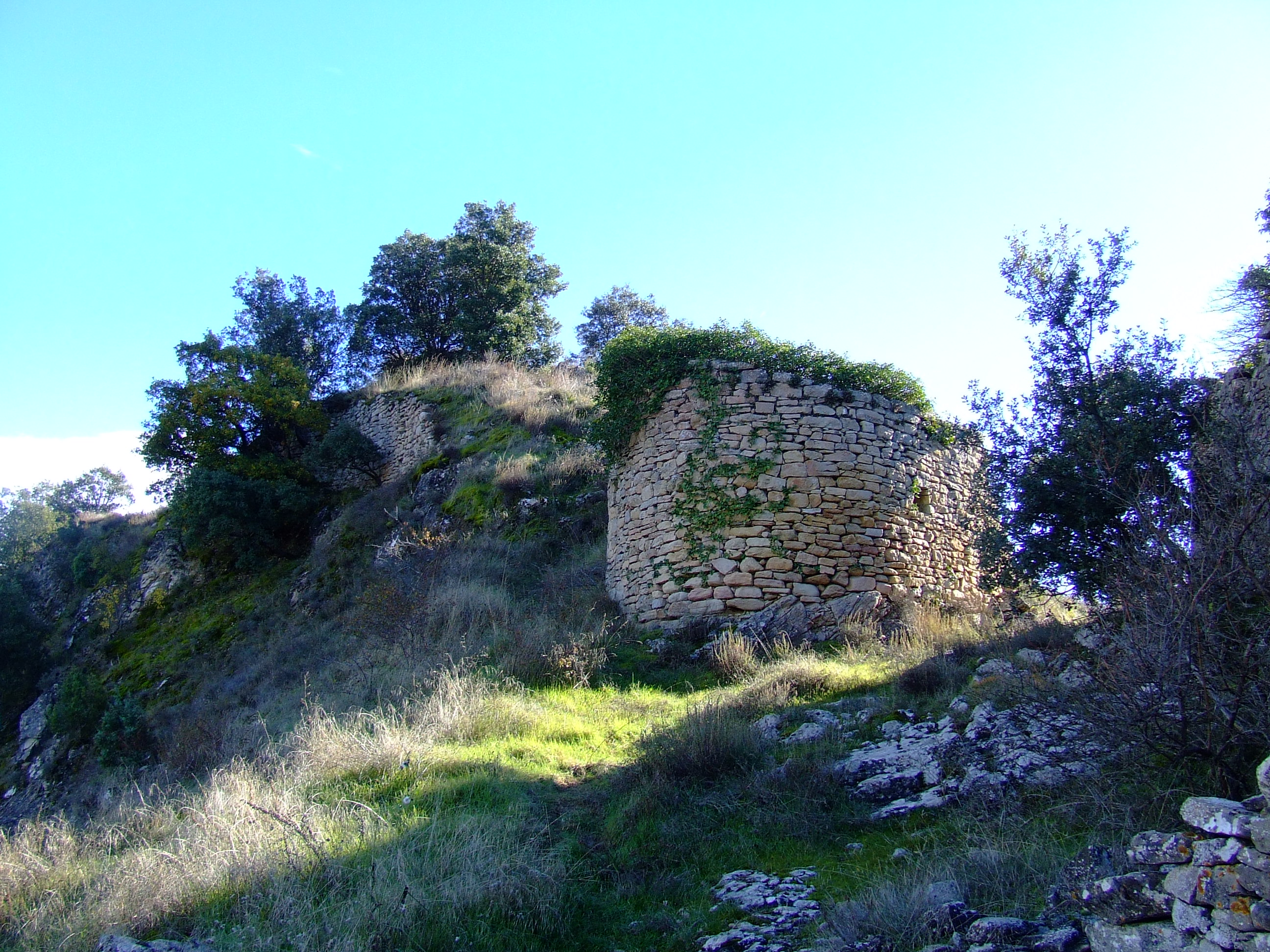 Portal del poble vell de Biscarri (Benavent de la Conca, Isona i Conca Dellà, Pallars Jussà)